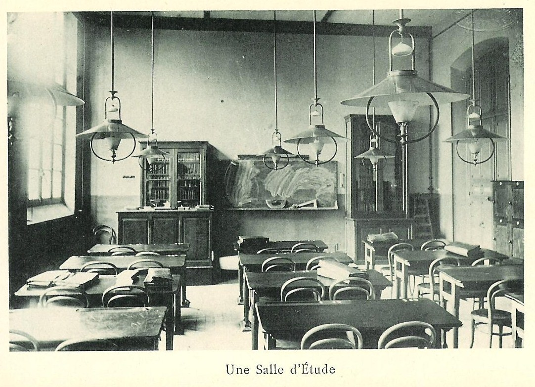 Salle d'étude du lycée Molière (Paris)